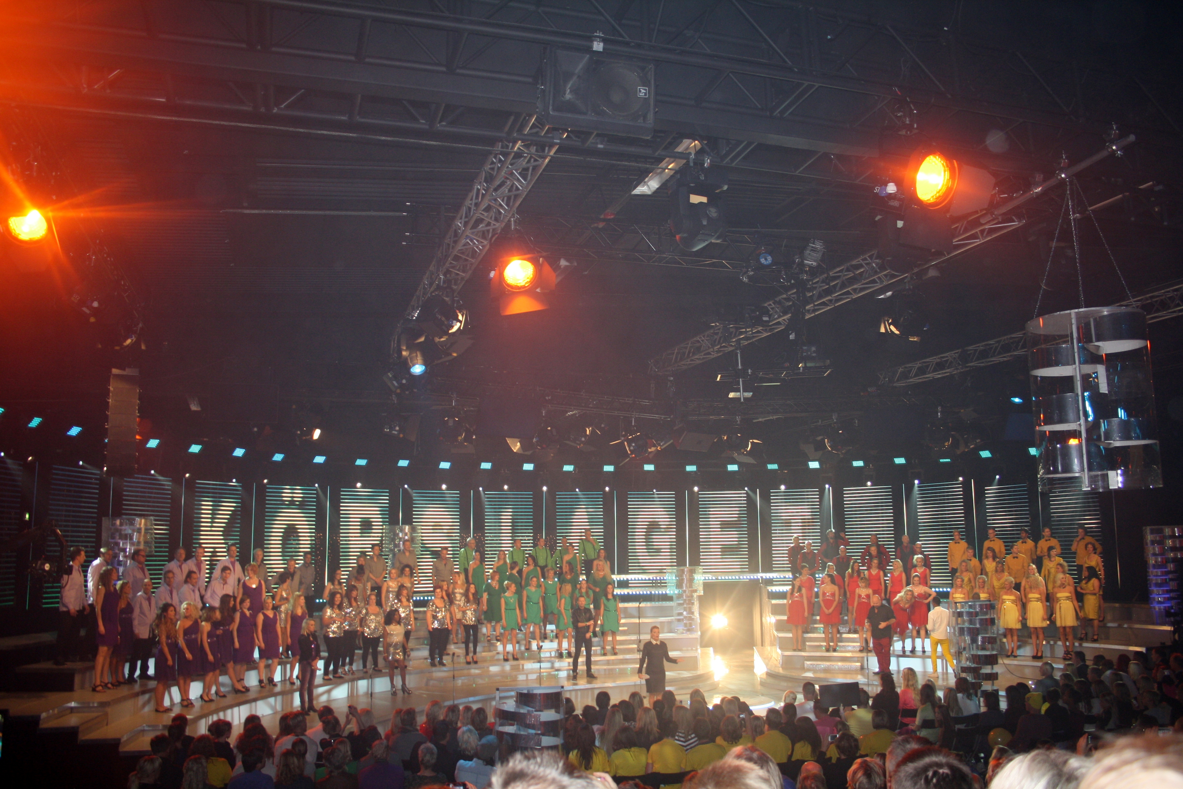 Körslaget minuter innan sändning